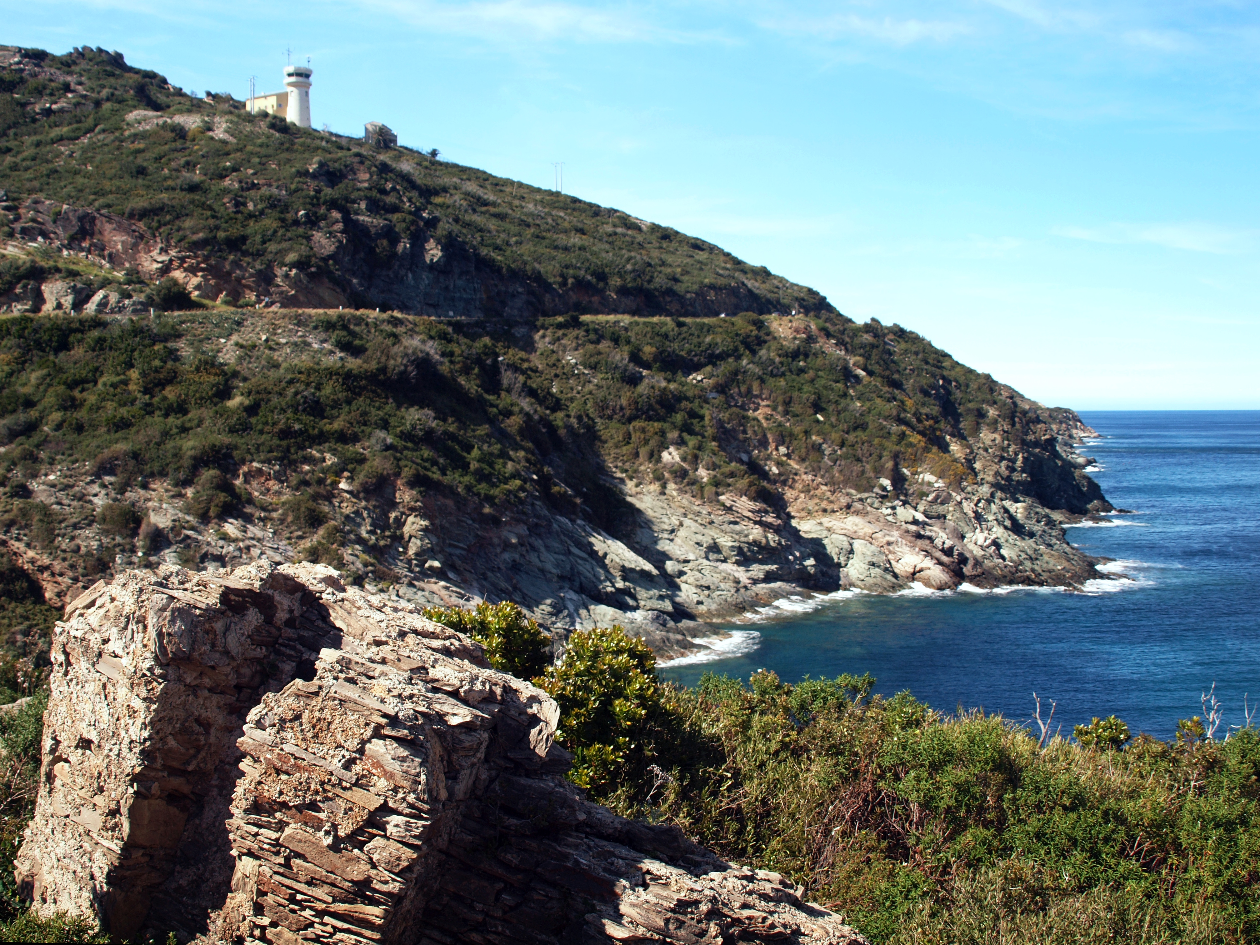 Sisco, Cap Corse (Corse) - Le sémaphore de Sagro vu depuis la tour génoise ruinée de Cap Sacro (Brando)